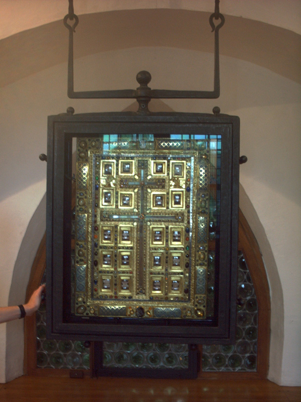 Kreuz-Reliquie in der St. Matthias Basilika